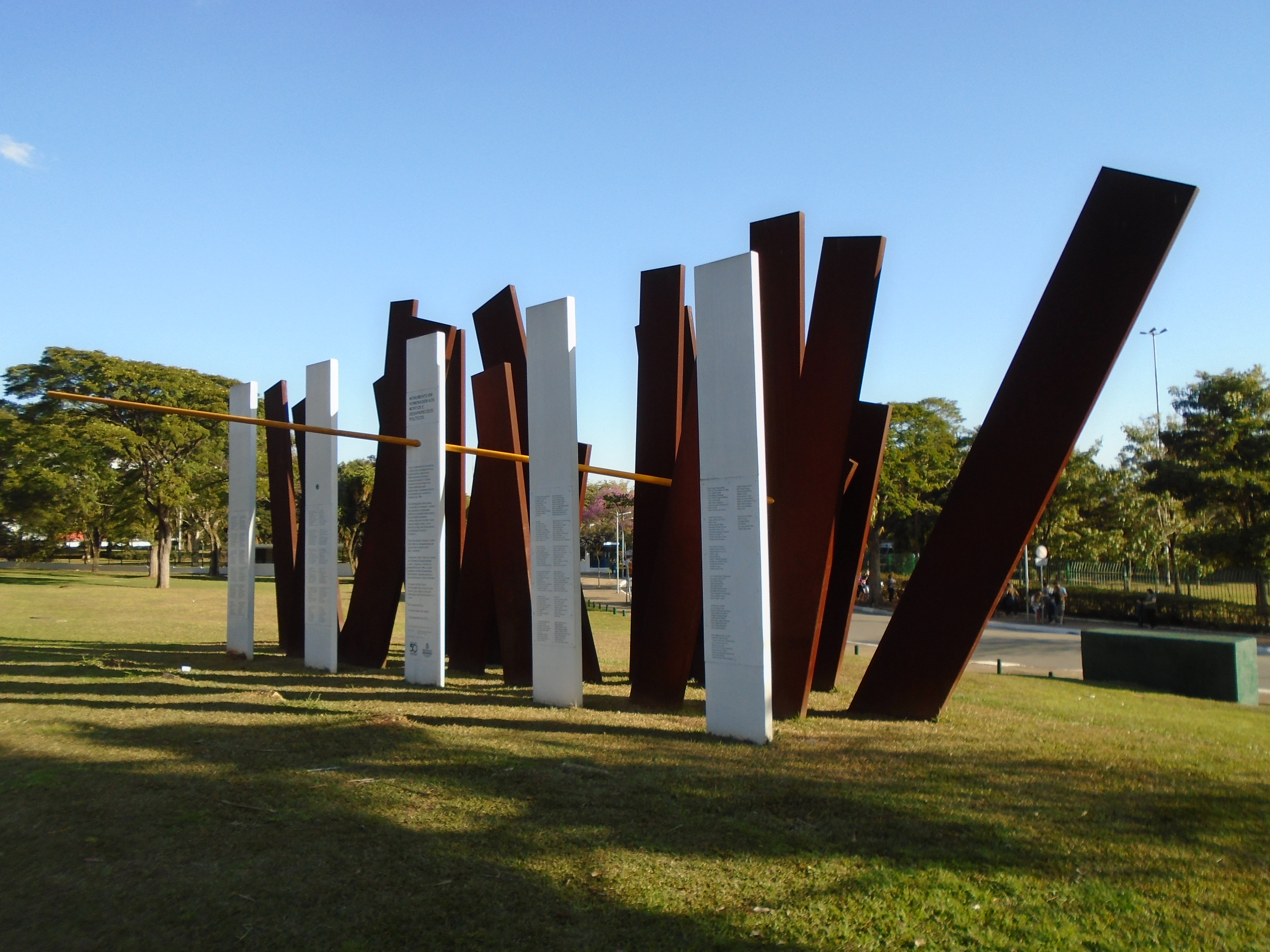 Ibirapuera